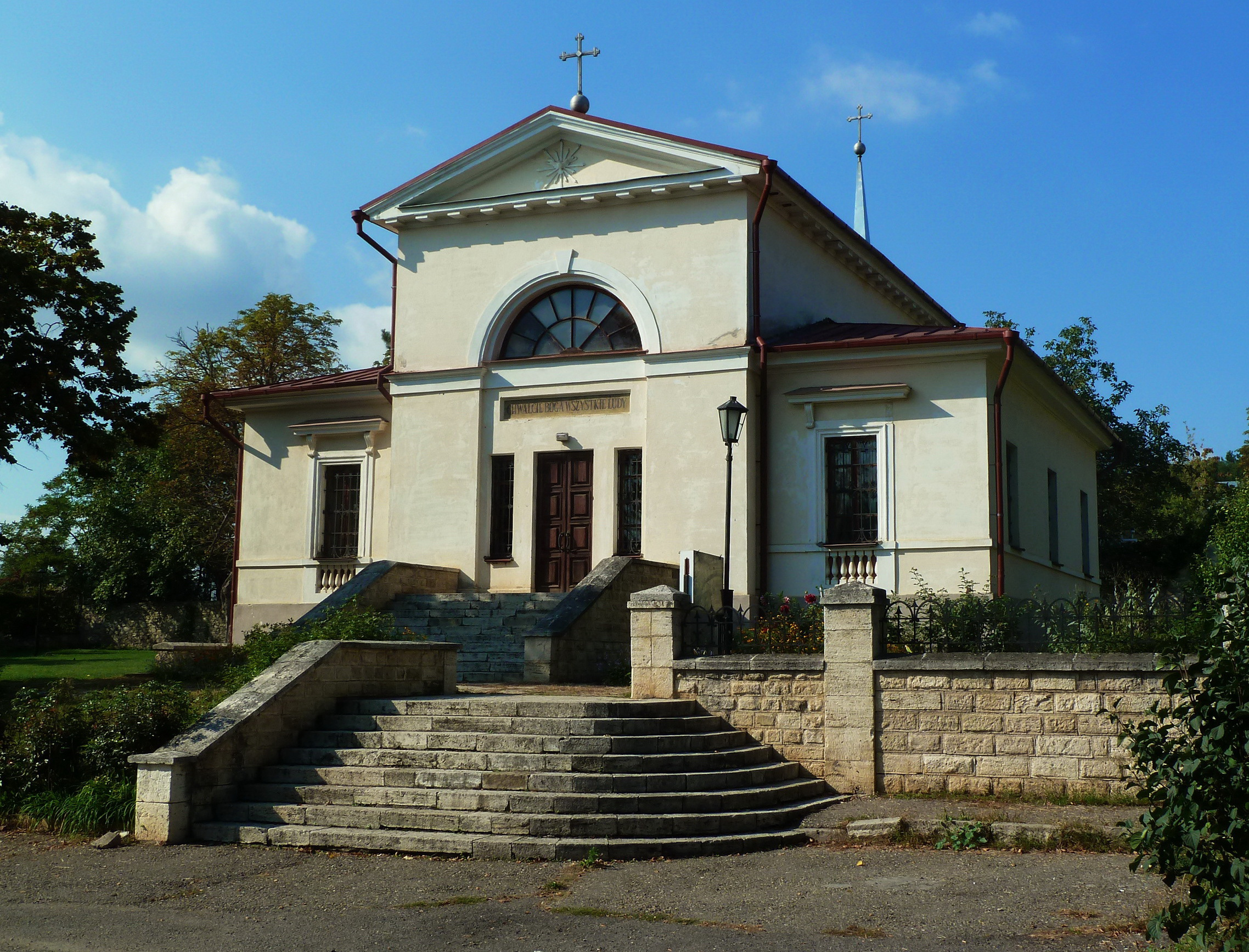 Ансамбль Преображенскго костела (Ставропольский край, Пятигорск, Анисимова улица, 1-3)